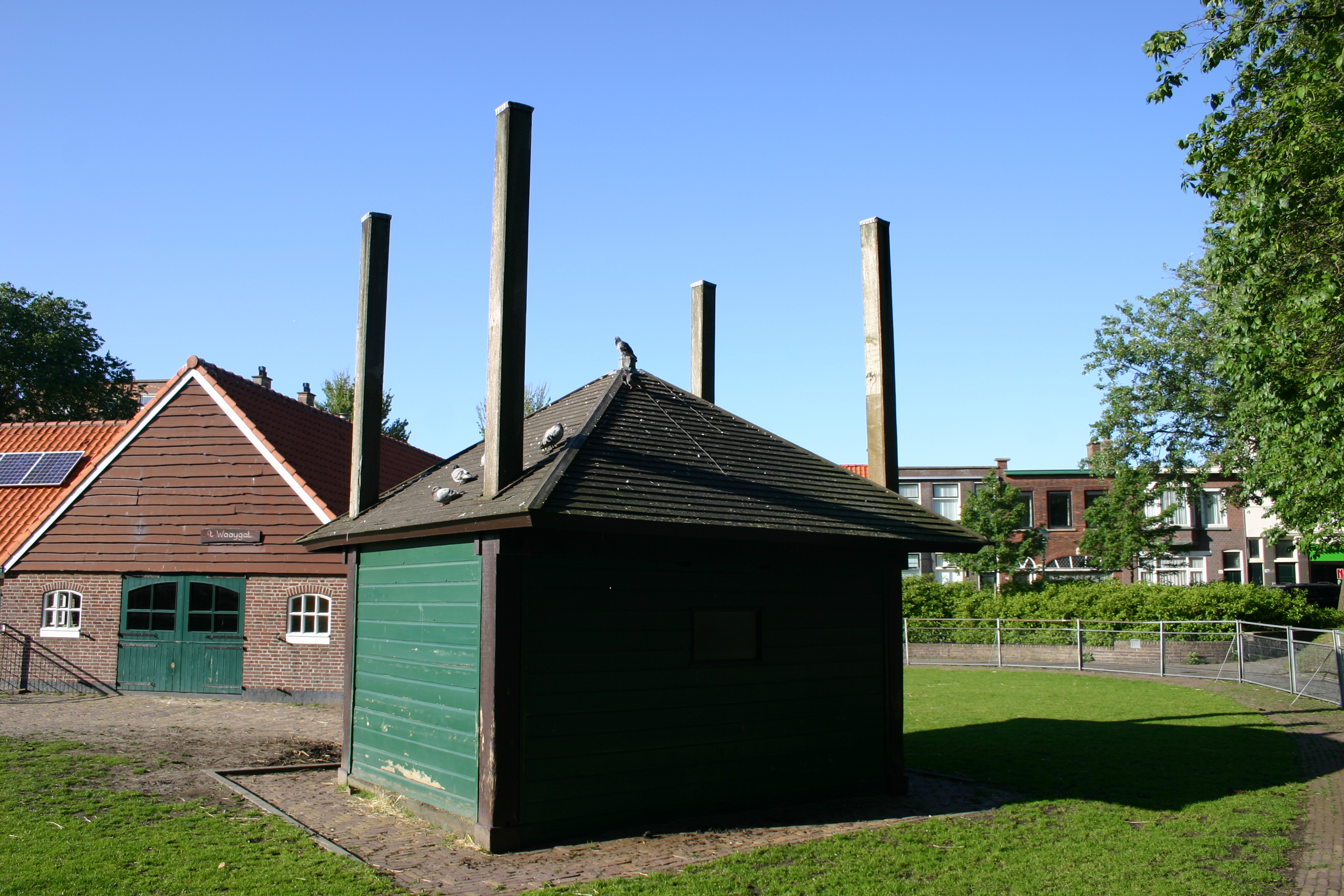 Kinderboerderij Het Waaygat, Havenkade 75 Scheveningen.